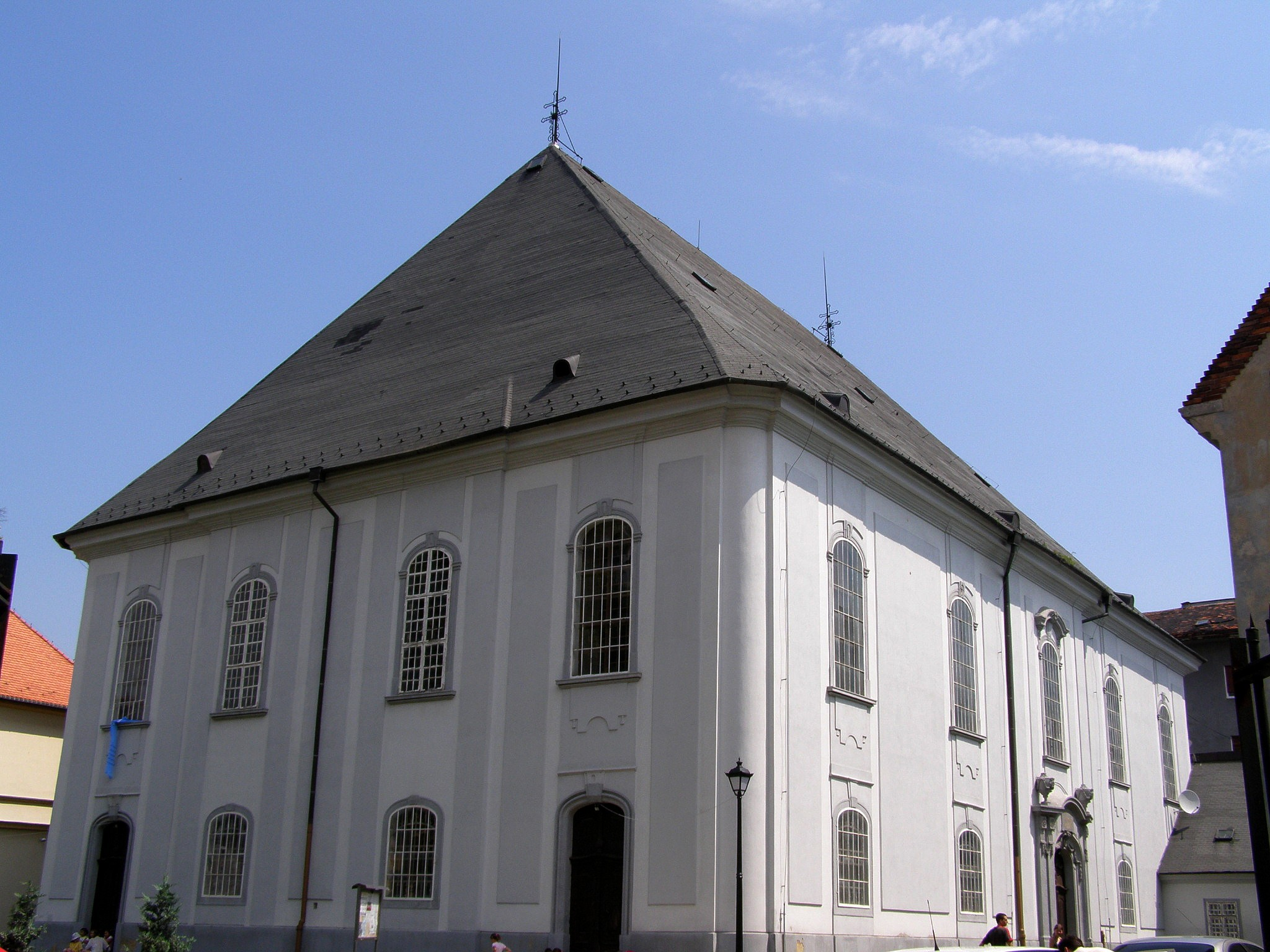 Veľký evanjelický kostol na Konventnej (Panenskej) ulici Object location48° 08′ 51″ N, 17° 06′ 19.8″ E